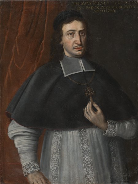 Беларуская (тарашкевіца): Партрэт Караля Пятра Панцажынскага (Karal Piotar Pancažynski)